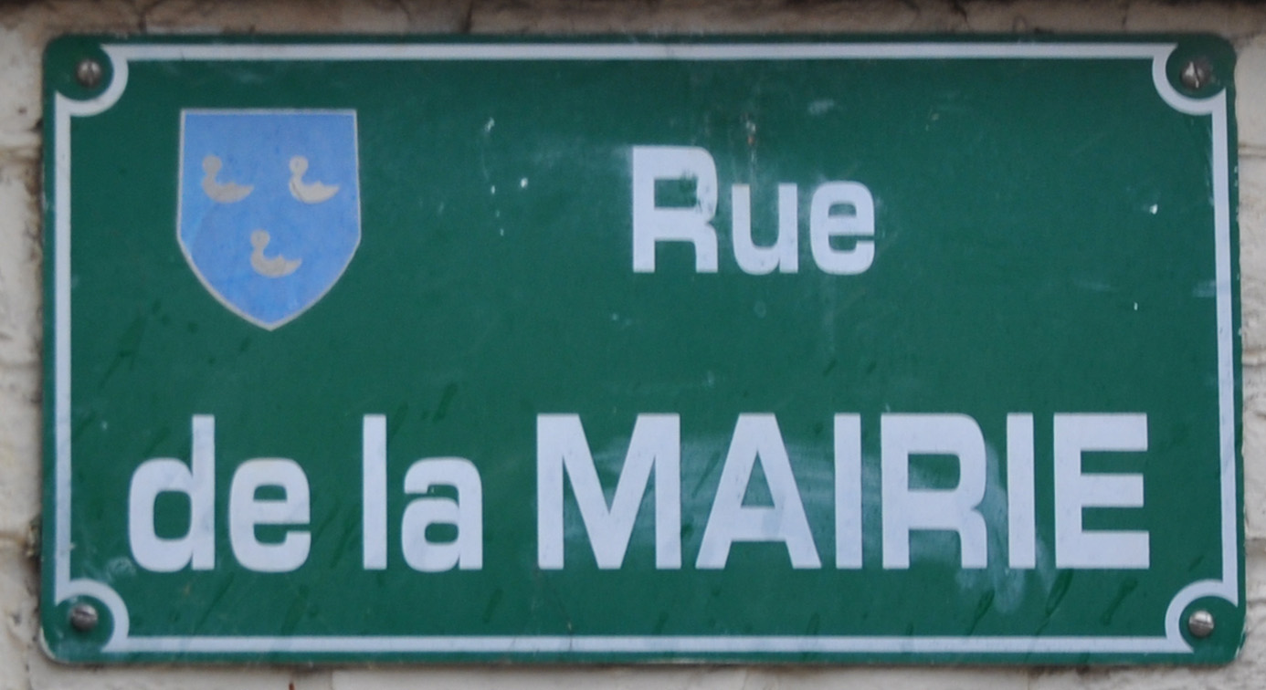 Rue de la Mairie, à Péronne-en-Mélantois